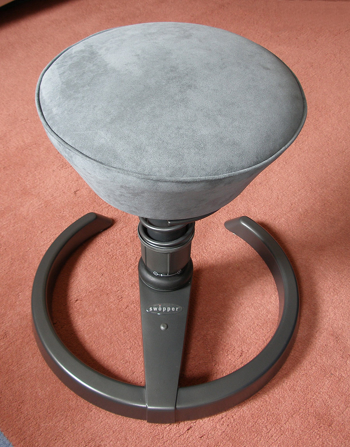 Swopper, grey